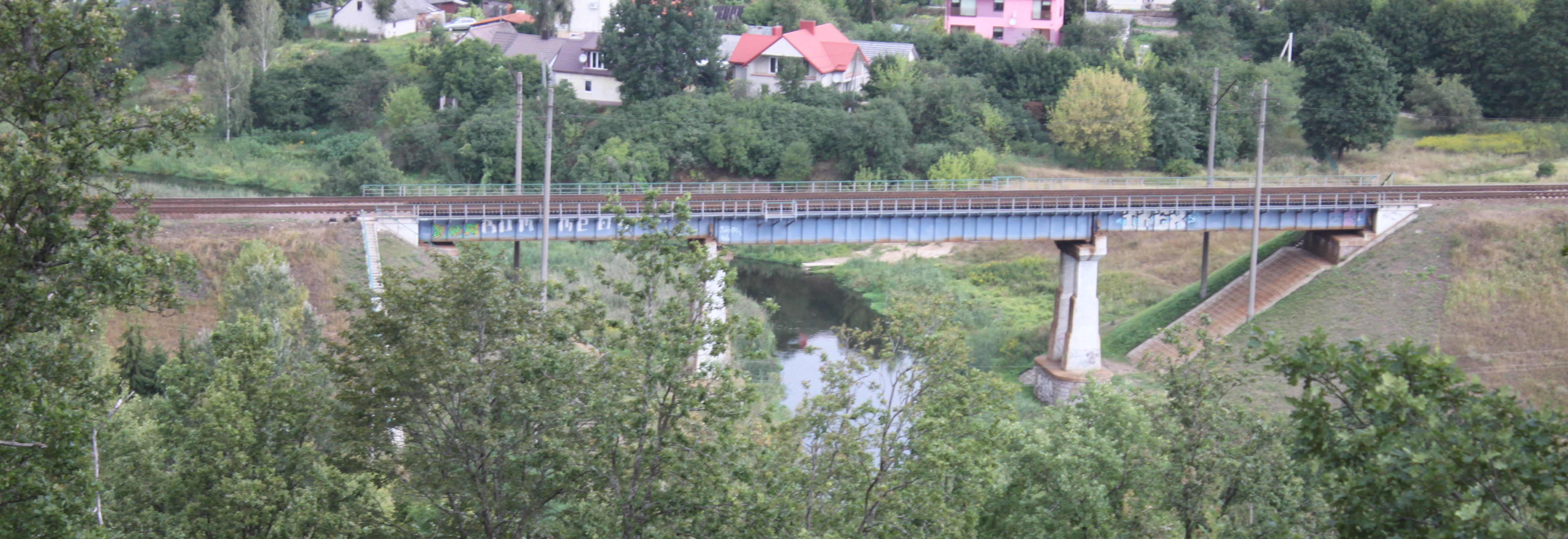 Geležinkelio tiltas per Vilnią, Naujoji Vilnia